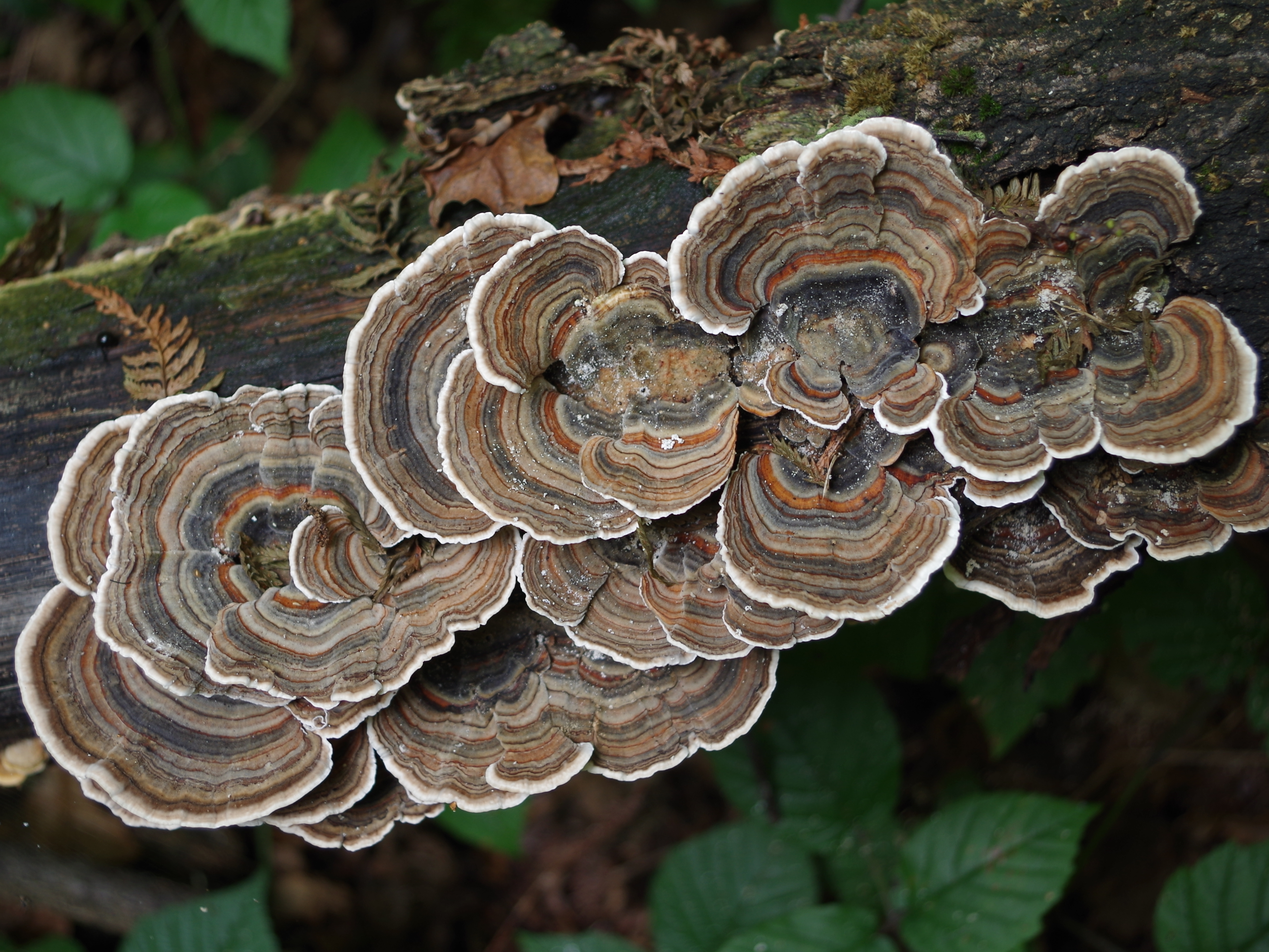 Trametes versicolor (location:Poland, Kamionna, województwo małopolskie)